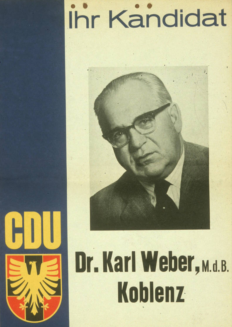 Ihr Kandidat Dr. Karl Weber, M.d.B. KoblenzAbbildung:PorträtfotoPlakatart:AnkündigungsplakatAuftraggeber:Verantw.: CDU-Bundesgeschäftsstelle BonnDrucker_Druckart_Druckort:Repro-Druck, Schmiden bei StuttgartObjekt-Signatur:10-001: 1087Bestand:Plakate zu Bundestagswahlen (10-001)GliederungBestand10-18:Plakate zu Bundestagswahlen (10-001) » Die 4. Bundestagswahl am 17. September 1961 » CDU » Mit PorträtfotoLizenz:KAS/ACDP 10-001: 1087 CC-BY-SA 3.0 DE